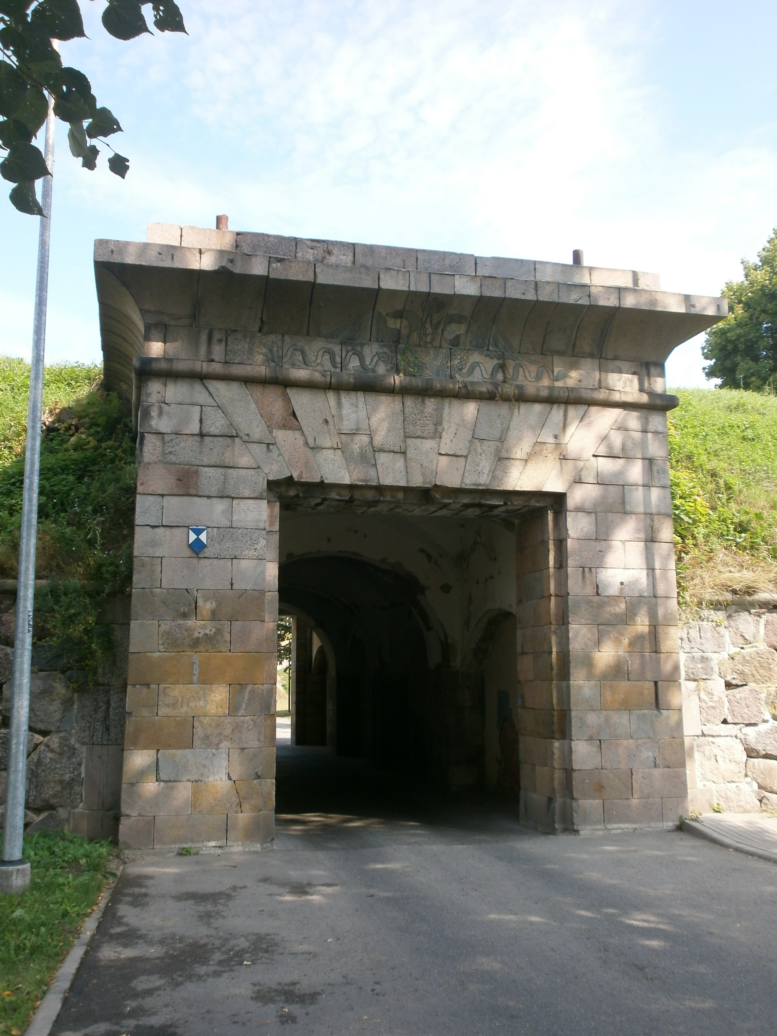 Mihaila vārti Daugavpils cietoksnī